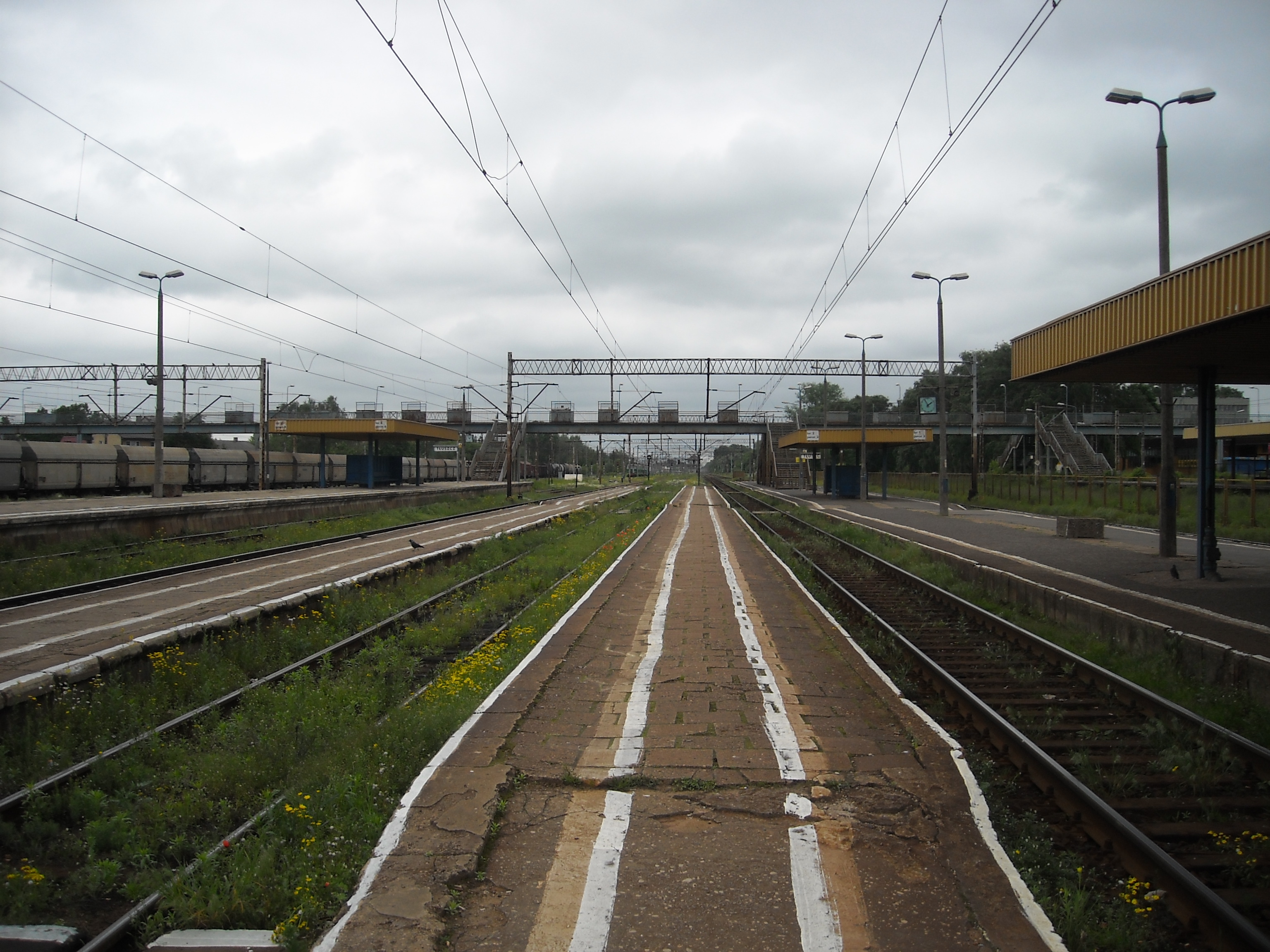 Stacja kolejowa Tłuszcz. Widok na perony 3,4,5 i 6 z peronu 2. Widok w kierunku Małkinii.